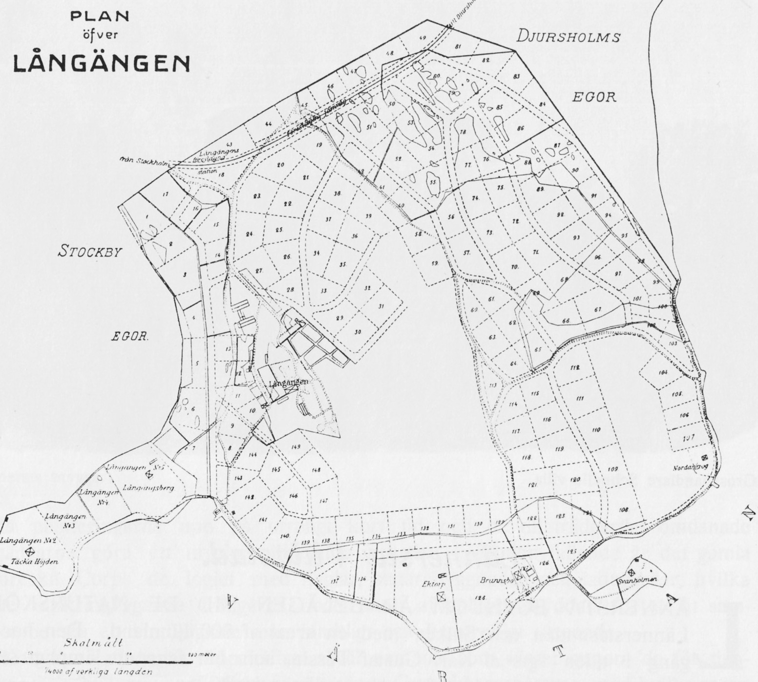 Plan över Långängen med styckning för villatomter